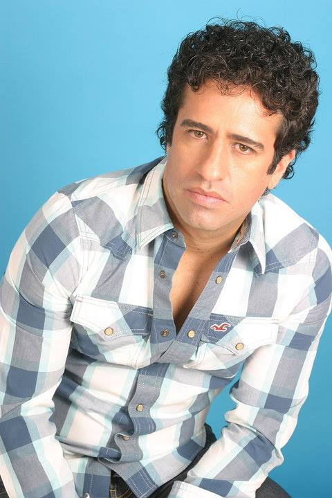 Manuel Medina